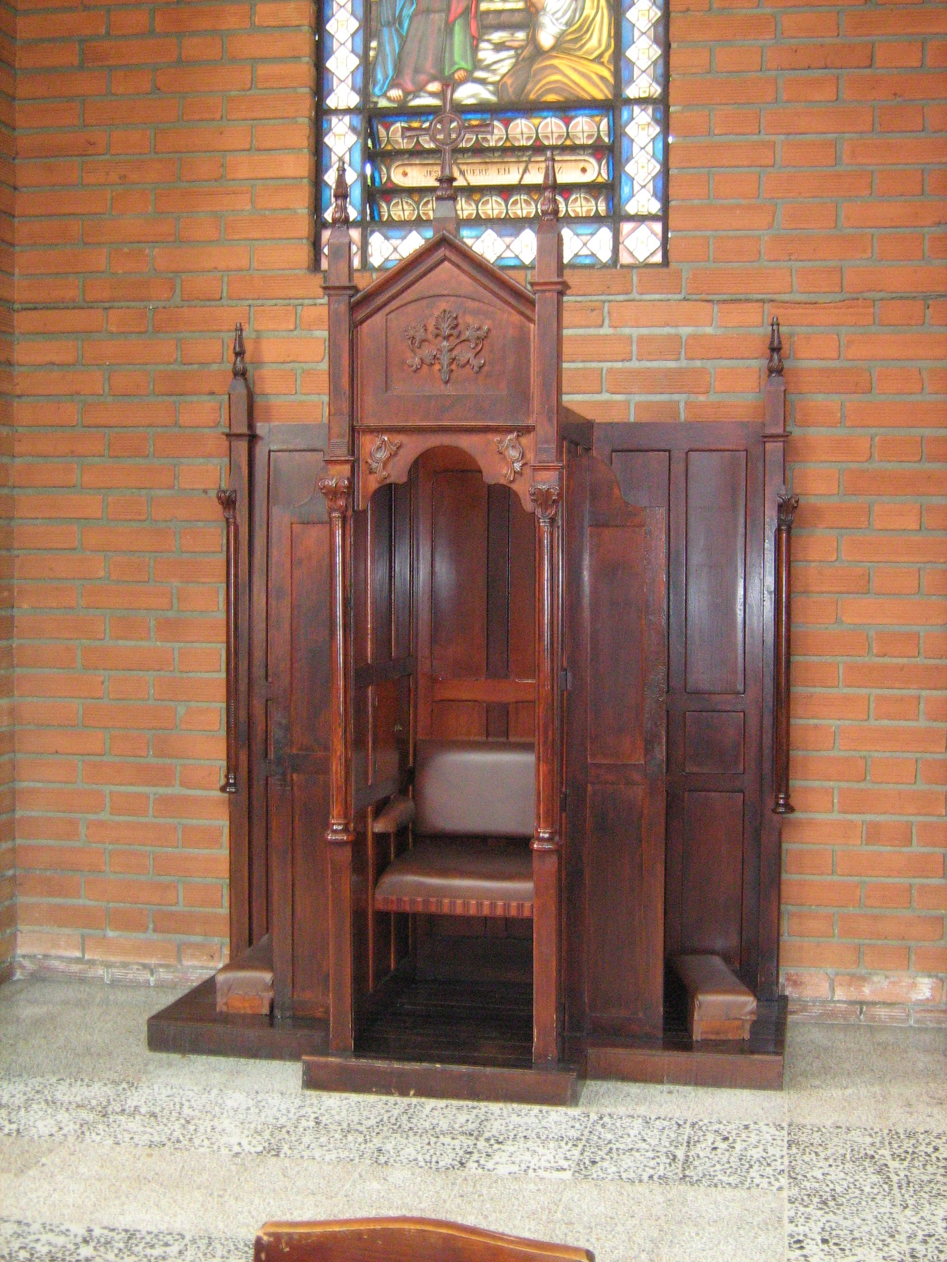 Iglesia de San Joaquín, Medellín, Colombia.